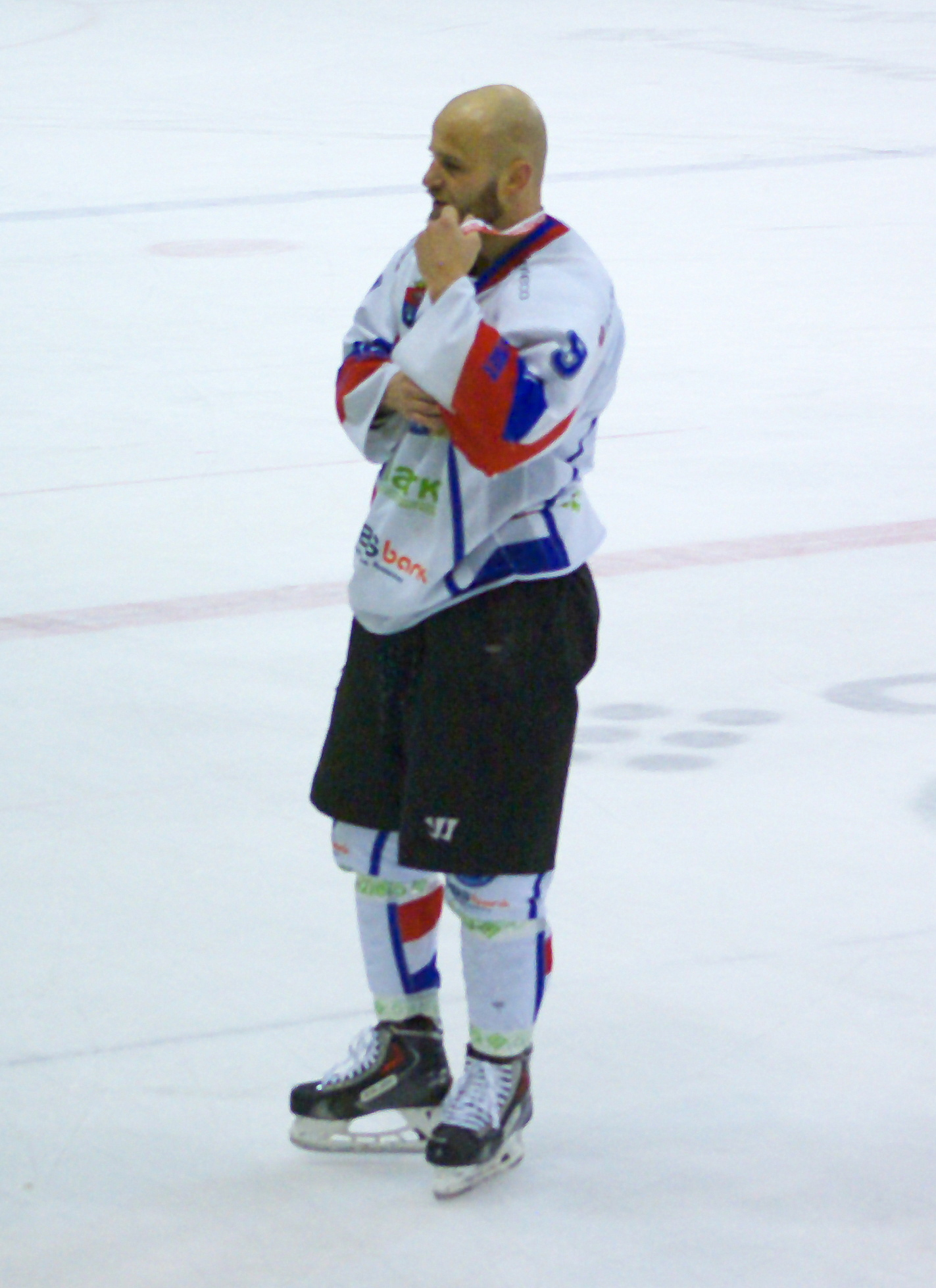 Szósty mecz finałowy o mistrzostwo Polski w hokeju na lodzie w sezonie PHL 2013/2014: Ciarko PBS Bank KH Sanok – GKS Tychy (2:0), 3 kwietnia 2014 w Sanoku (Arena Sanok). Petr Šinágl